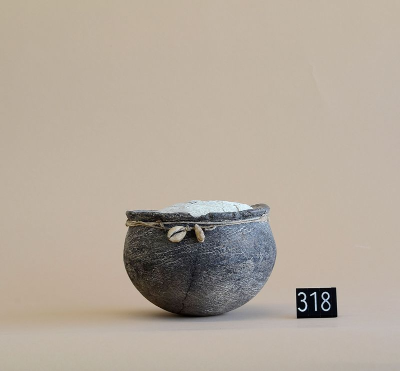 VASO globulare con labbro sporgente e superficie annerita.